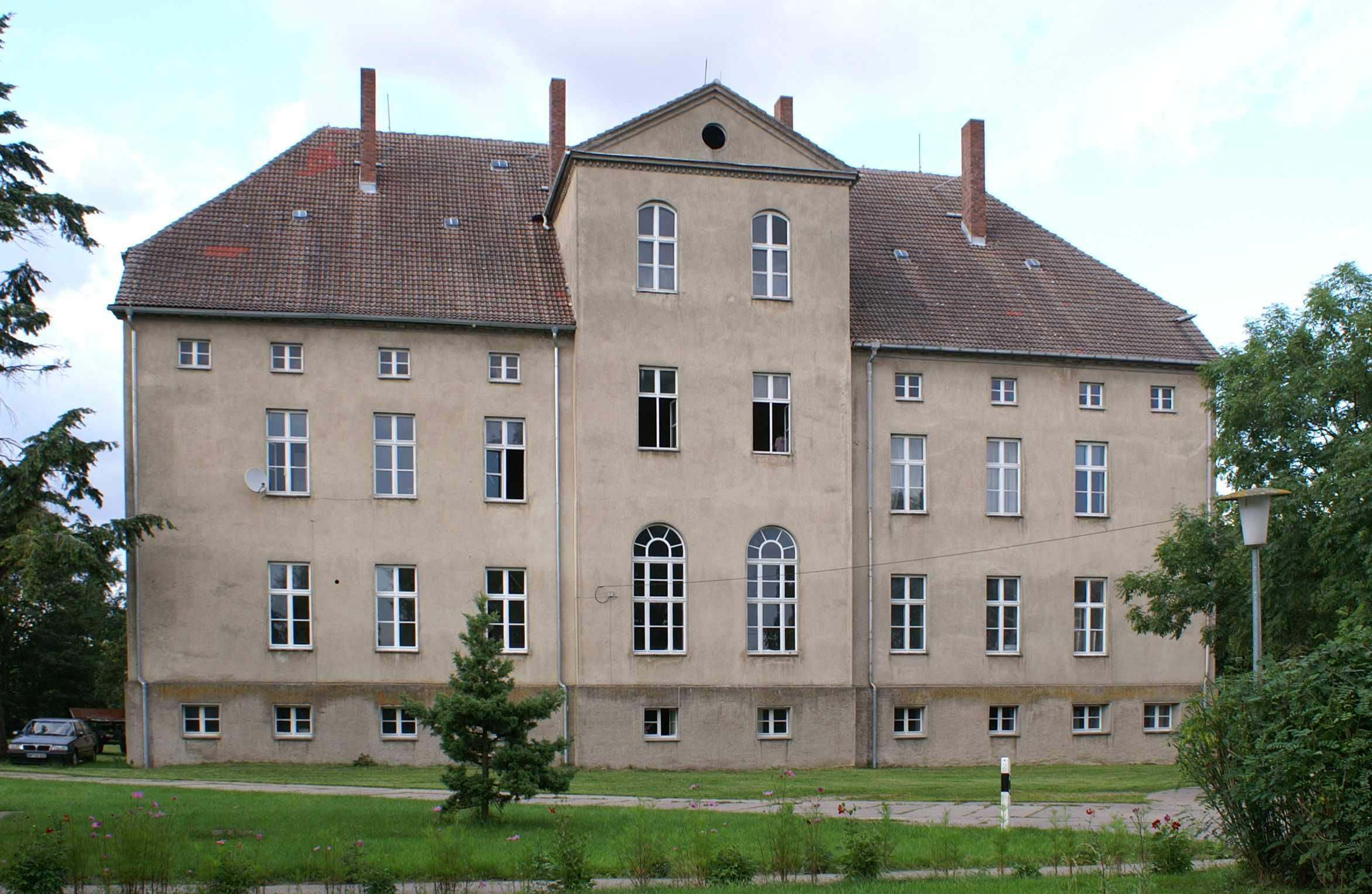 Alt Plestlin - Landkreis Demmin - Herrenhaus Südseite